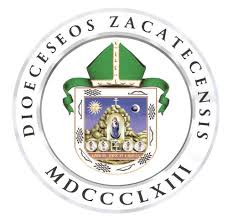 Escudo Diocesis de Zac